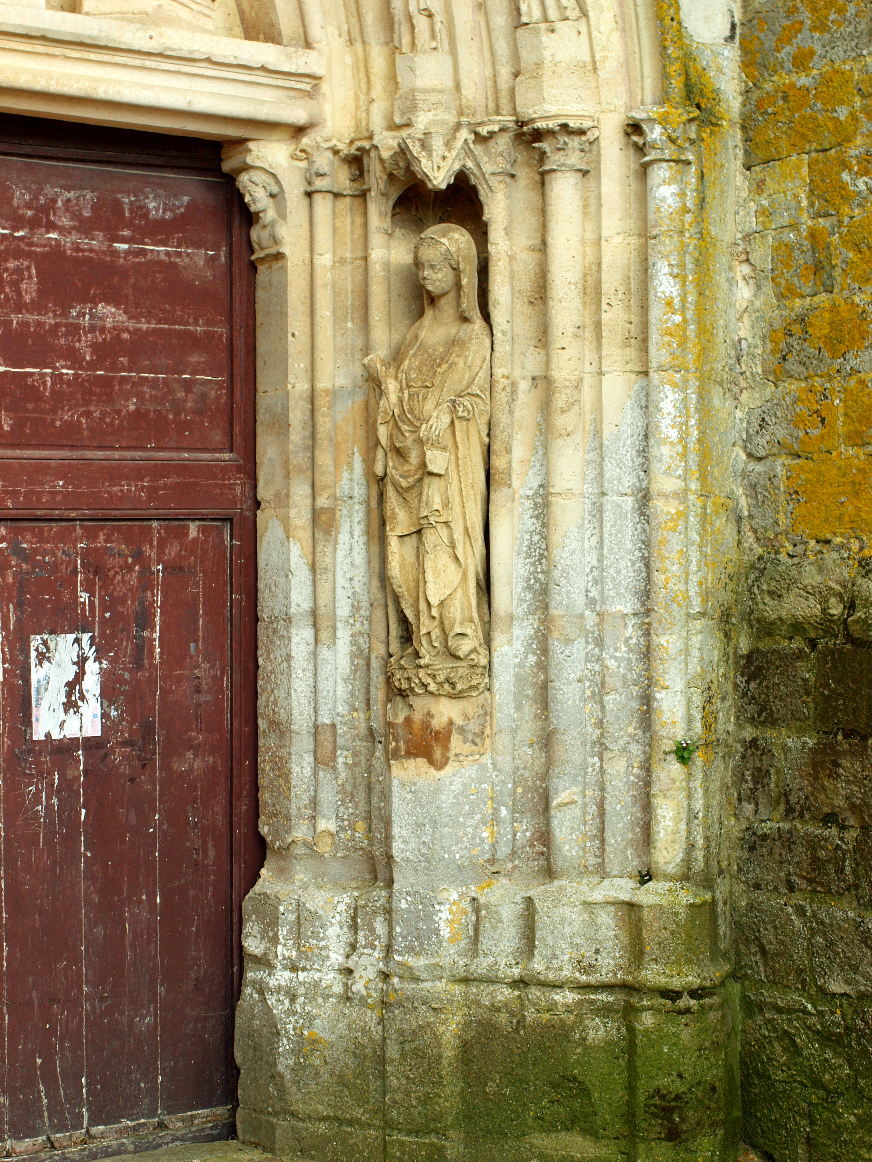 Église de Dixmont, (Yonne, France)